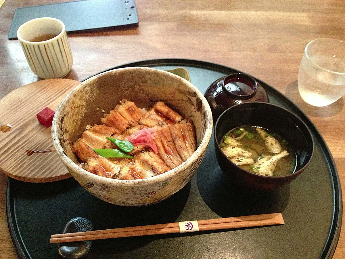 Anago meshi, あなご飯